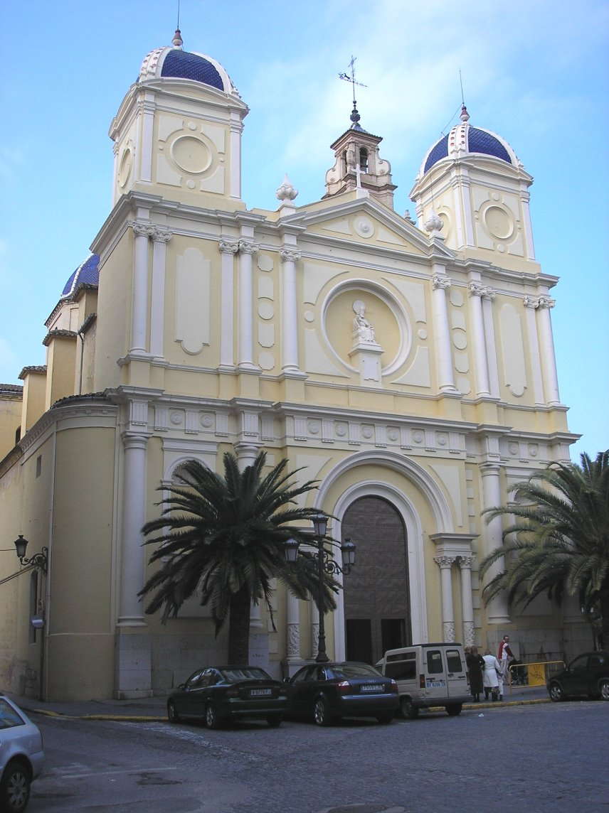 Sueca és un municipi valencià a la comarca de la Ribera Baixa. Esglèssia de Sant Pere.